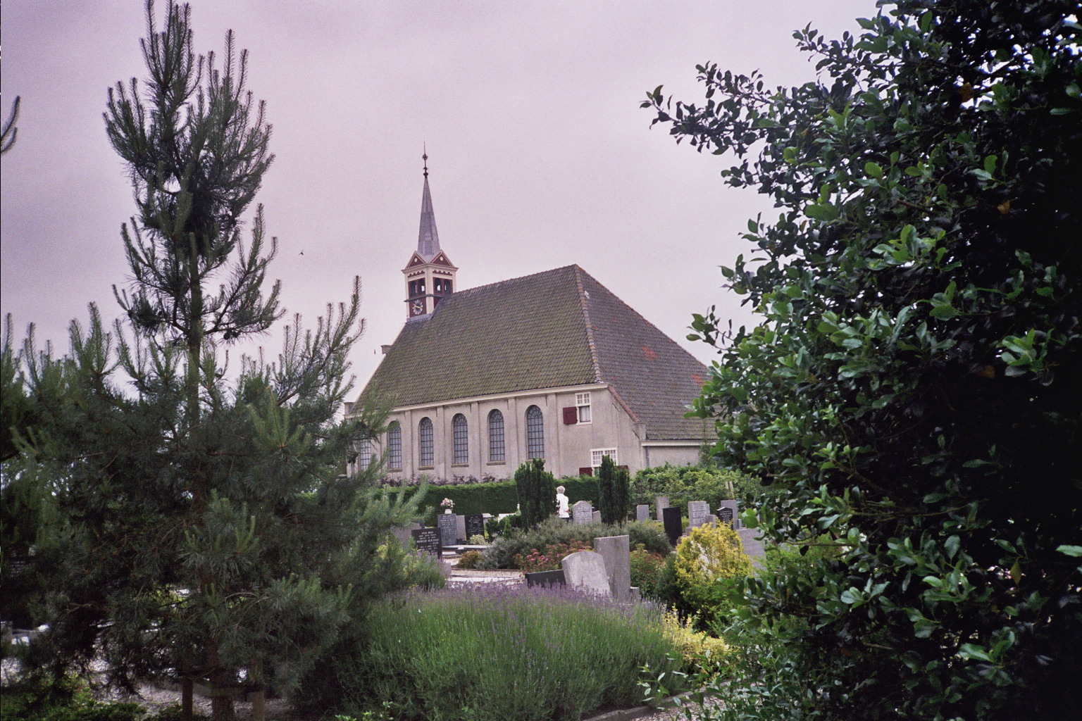 Hervormde Kerk, Sint Maartensbrug, The Netherlands